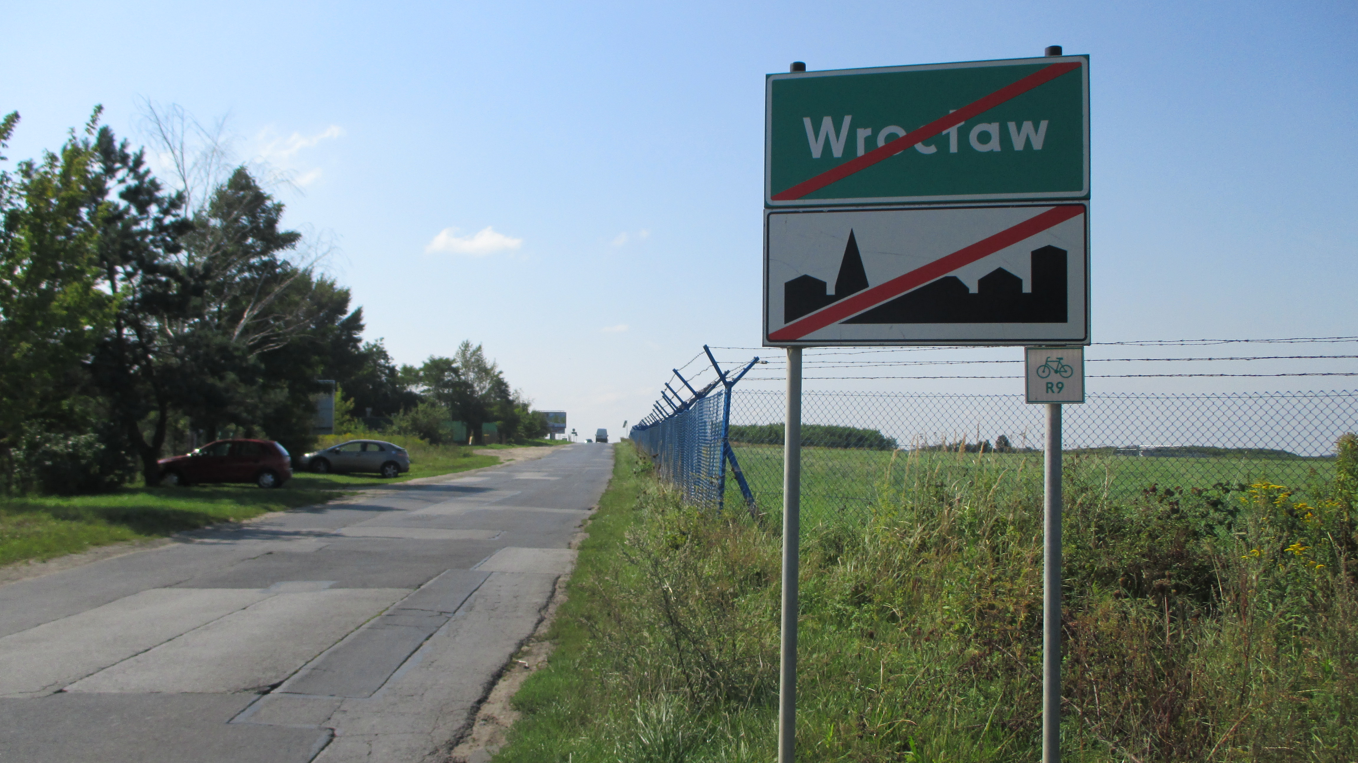 EuroVelo 9 - Wrocław, Polska